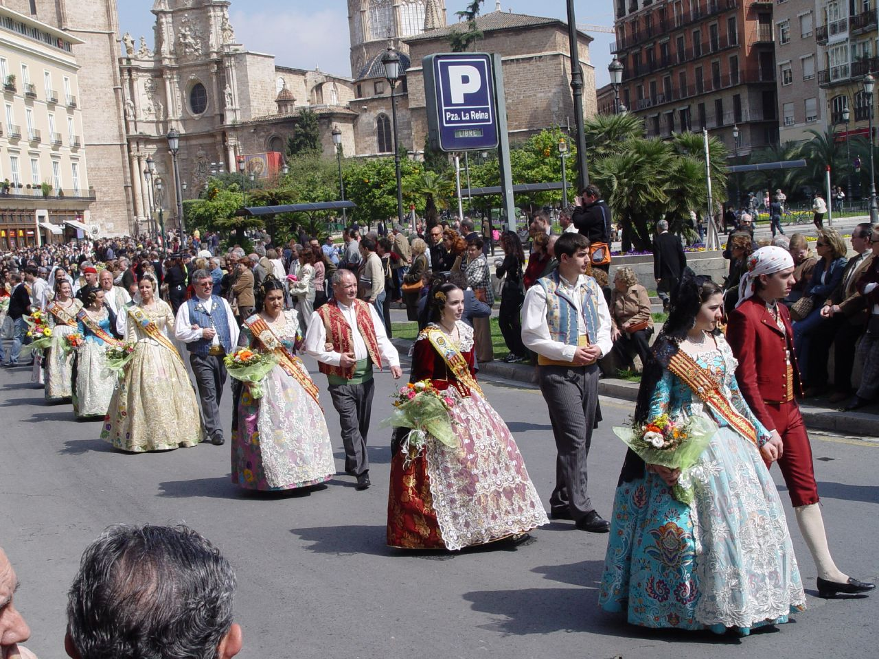 Parade in historical Valencian costumes